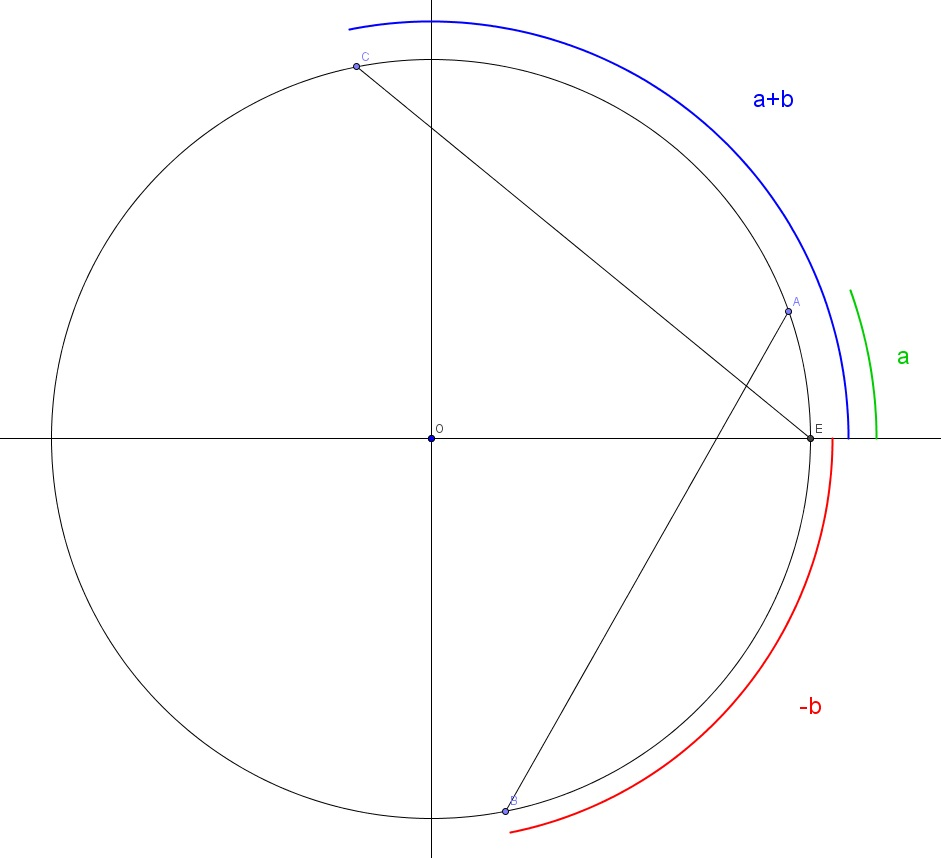 Imagem auxiliar para demonstrar o cosseno da soma